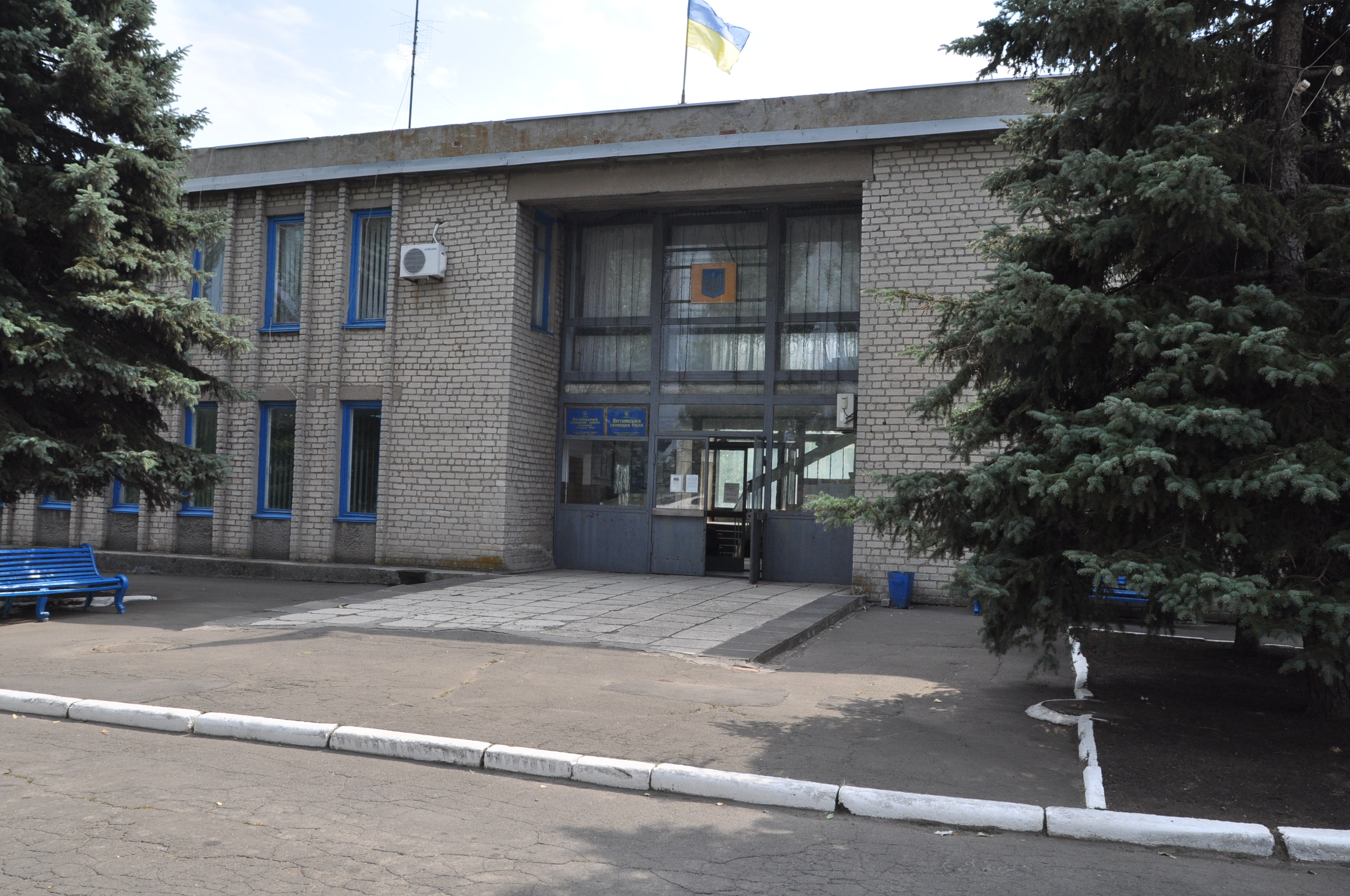 Донецкая область. Ялта.